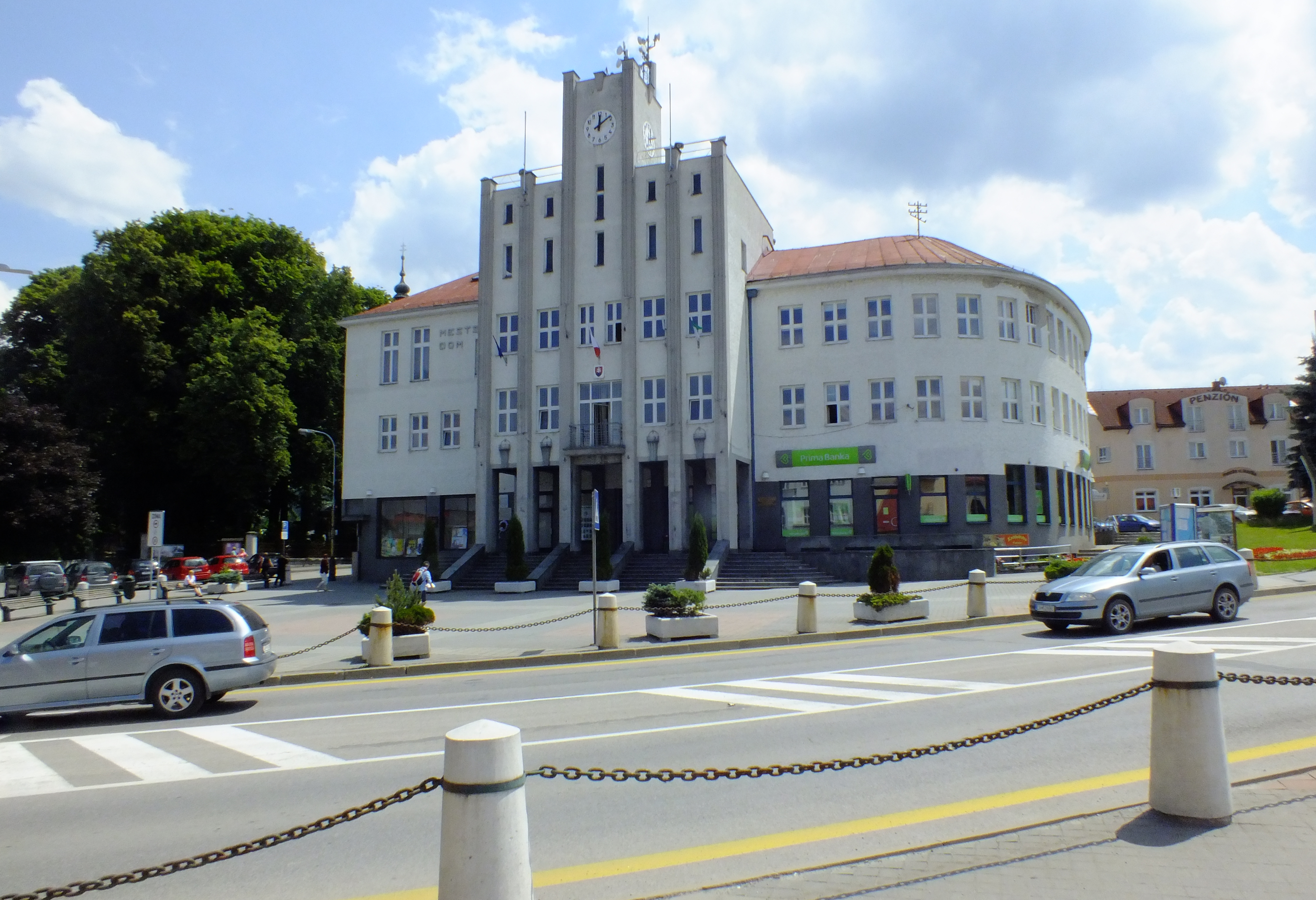 Městský úřad v ČadciSlovenčina: Mestský úrad v Čadci